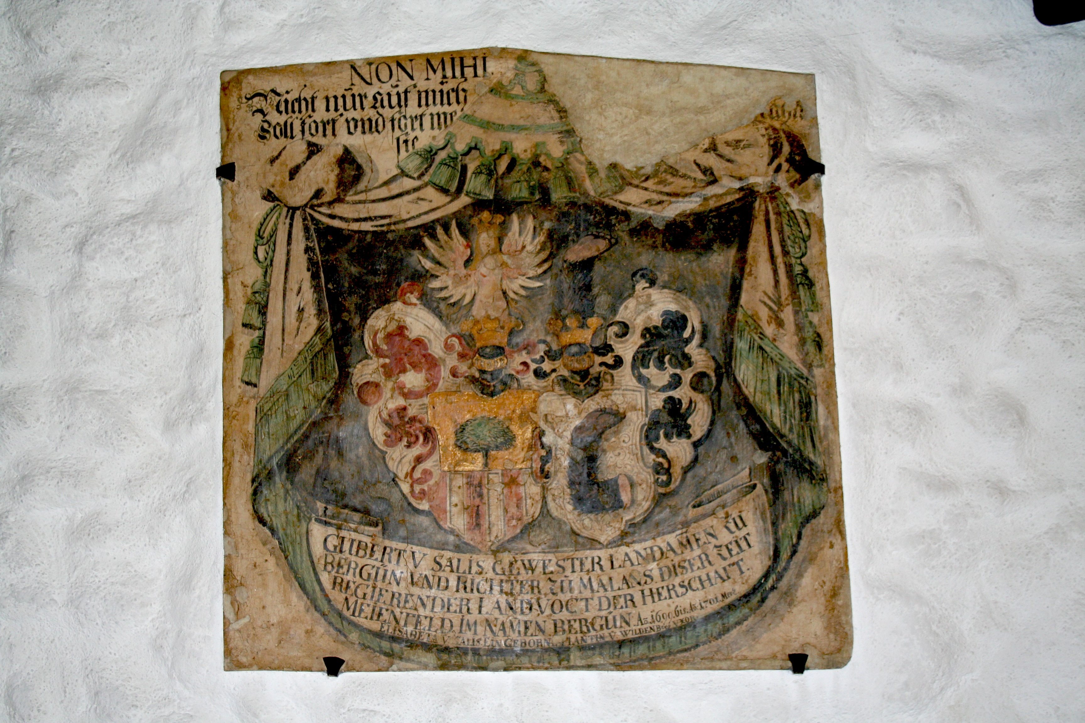 Schloss Brandis in Maienfeld: Wappen des Landvogts Gilbert von Salis im Saal